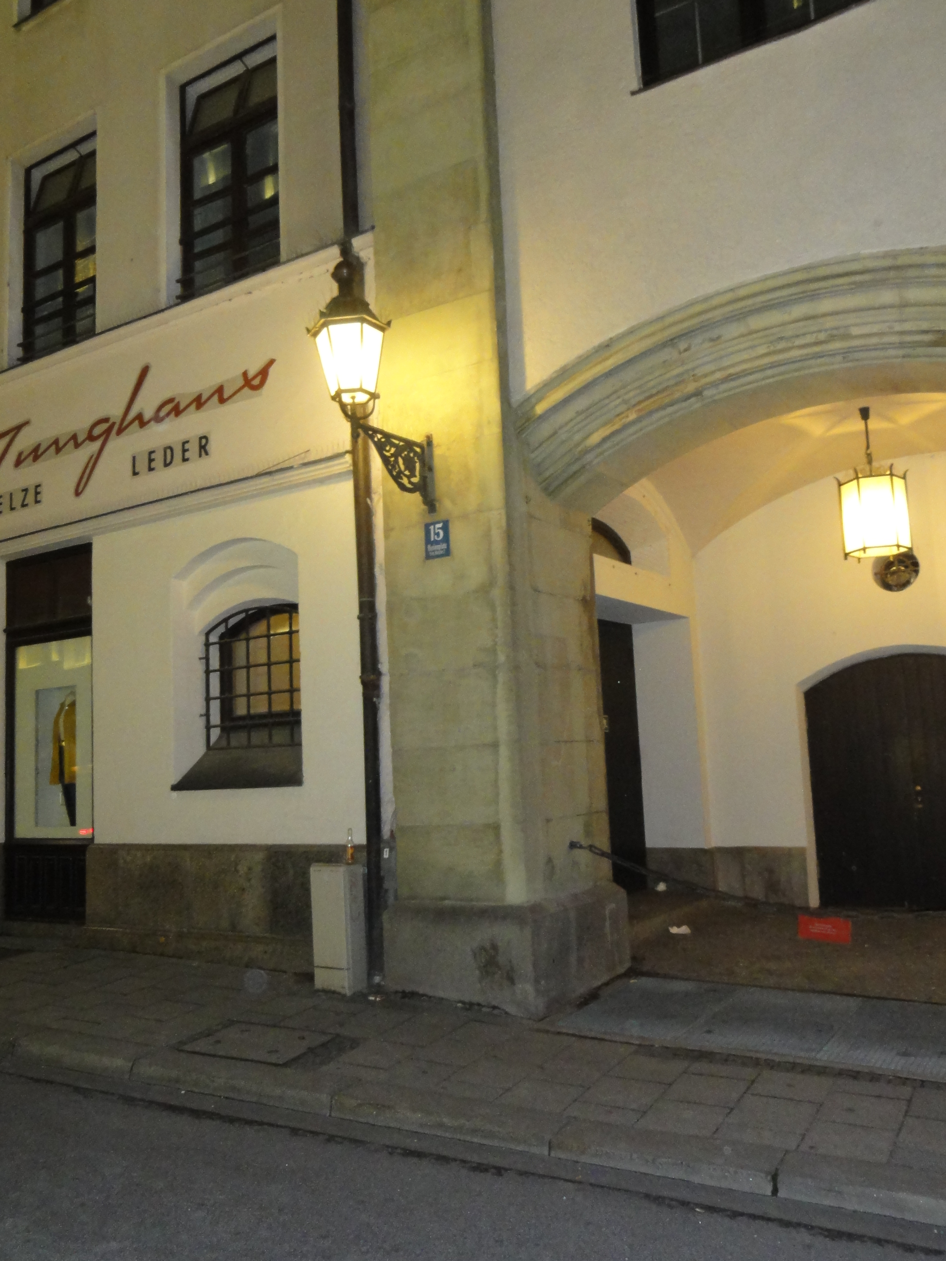 Altes Rathaus — ehem. Zentral-Gefängnis der Nachtwächter („Narrenhäusl“), bis ins Spätmittelalter wurden hier unerwünschte Personen bis um 06:00 Uhr (Öffnung der Stadttore) festgehalten und aus der Stadt gebracht.